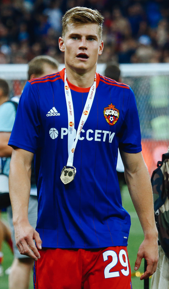 Первый трофей сезона — в руках ЦСКА. Как это было